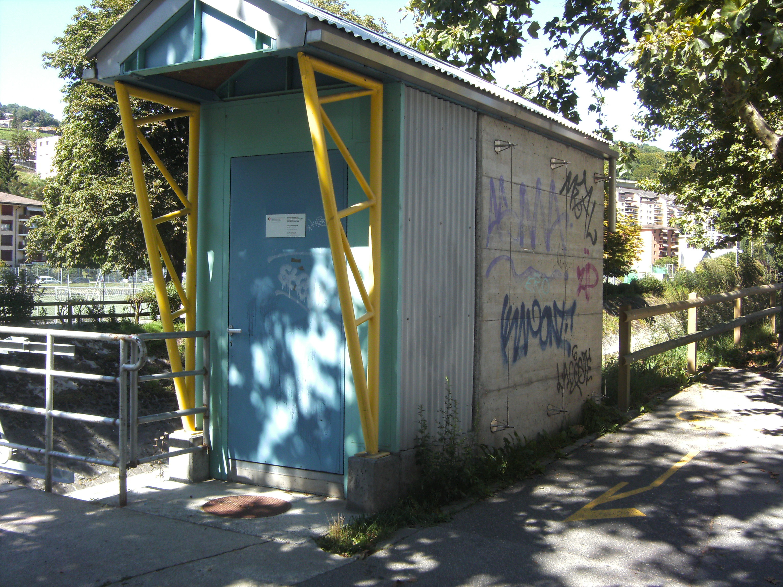 Veveyse (Vevey-Suisse) - Station hydrométrique 2486 de Vevey, Copet.